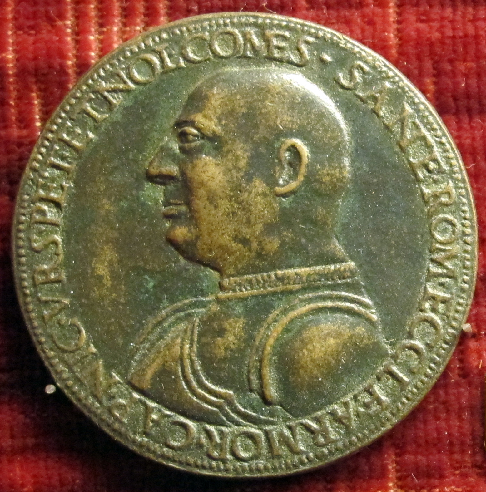 Medaglia di Niccolò Orsini (1442-1510), recto